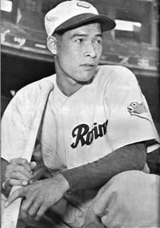 松竹ロビンス時代の小鶴誠